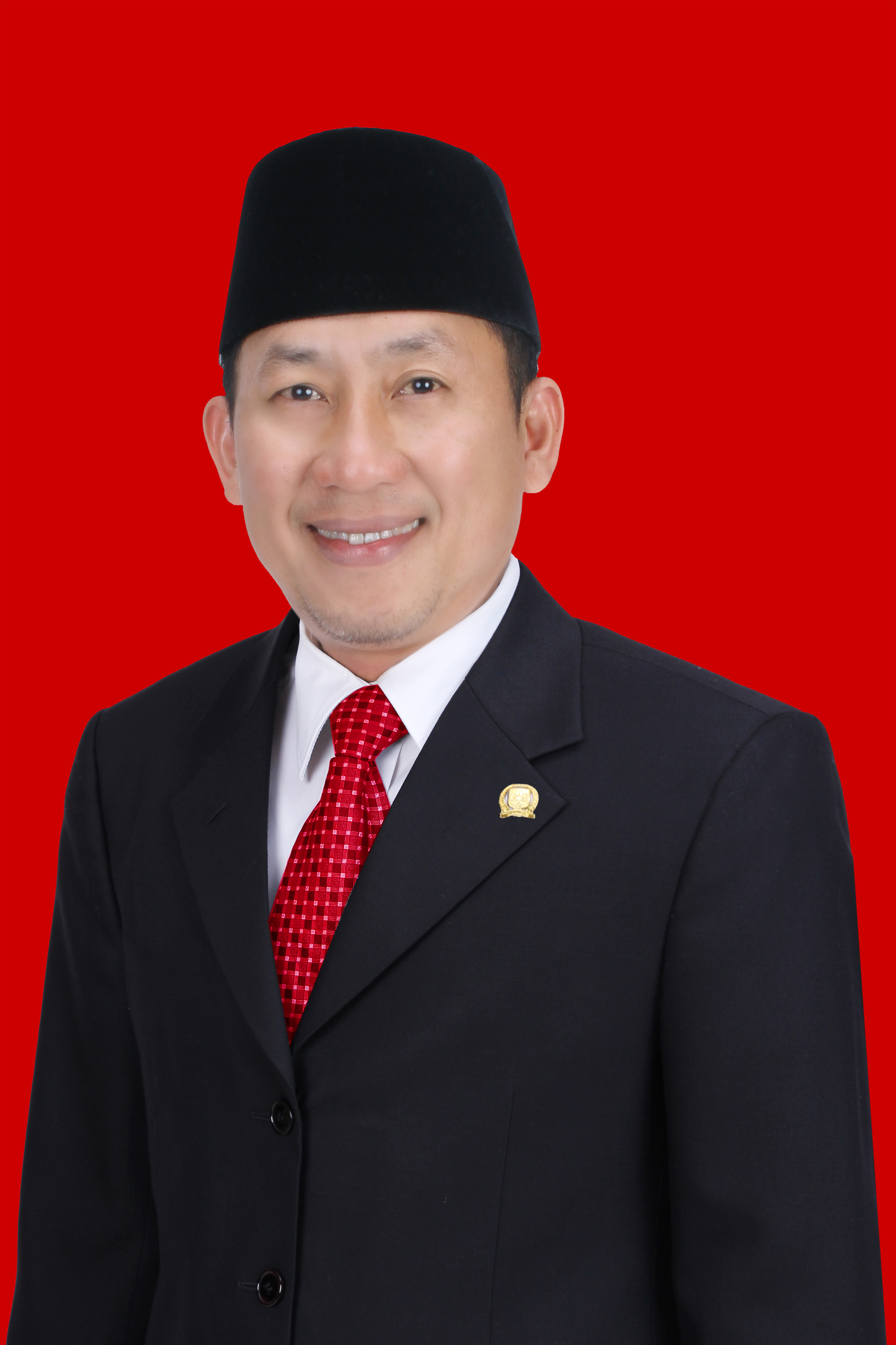 pas foti